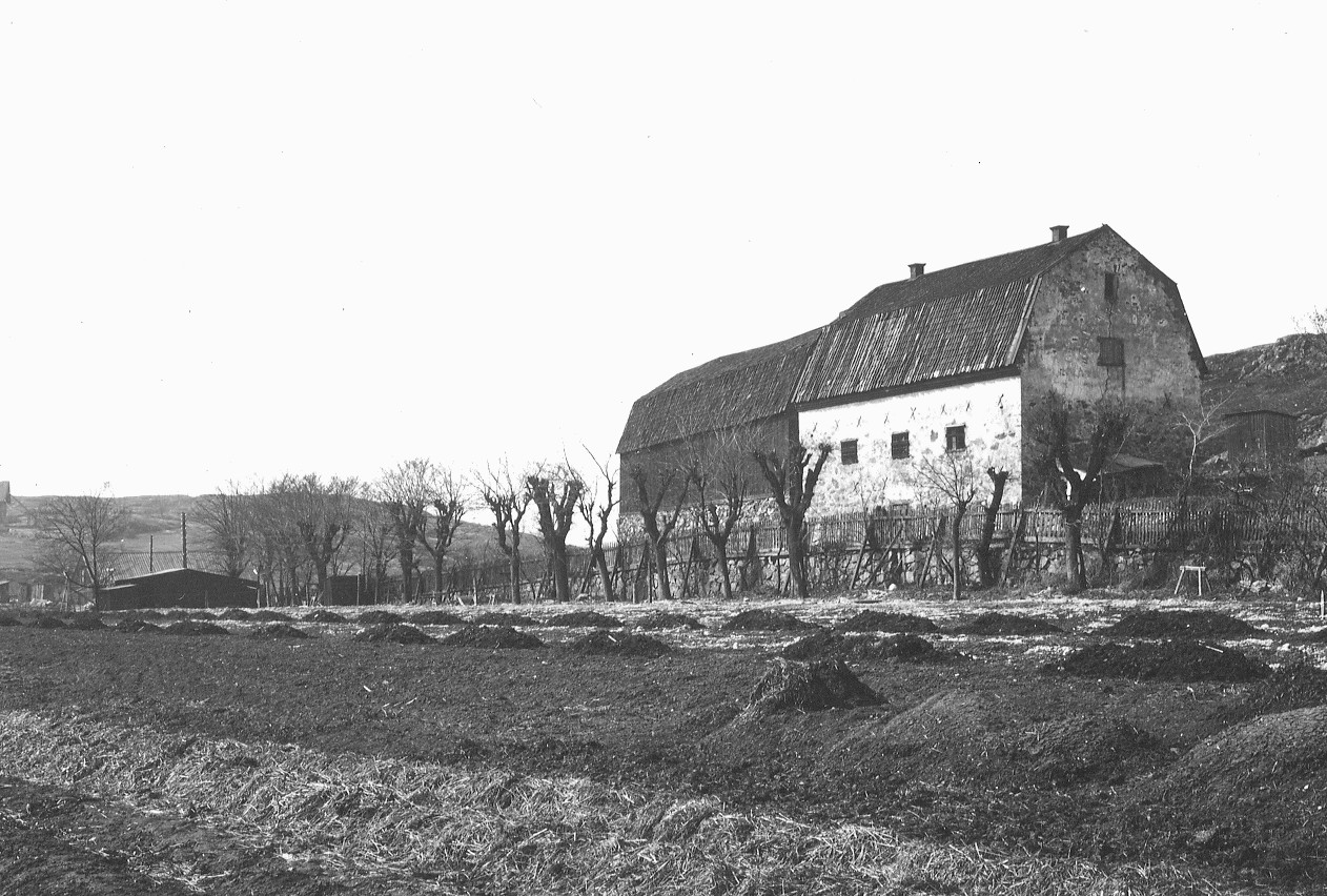 Zinkensdamms gård, ekonomibyggnader